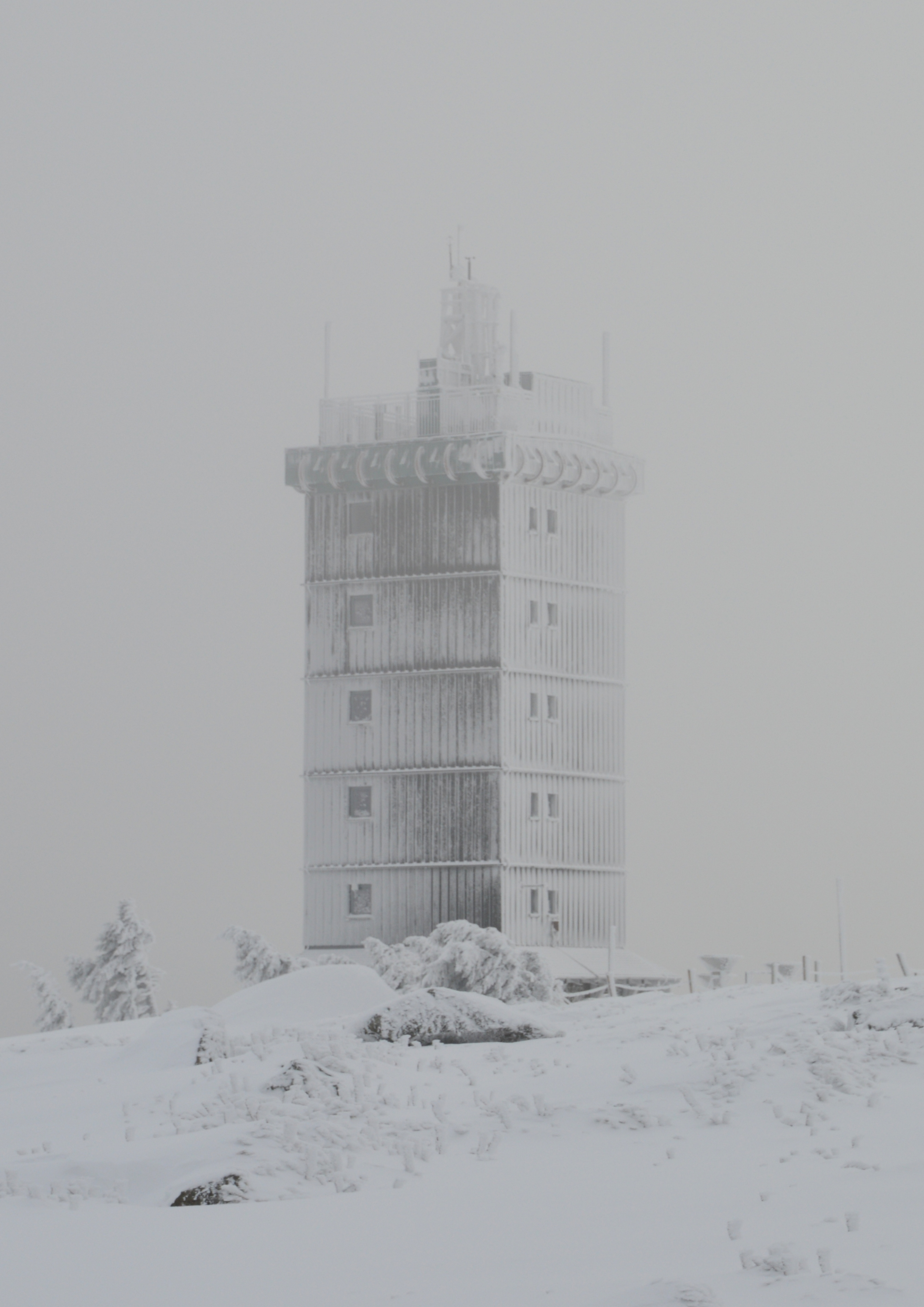 Wetterturm Brocken